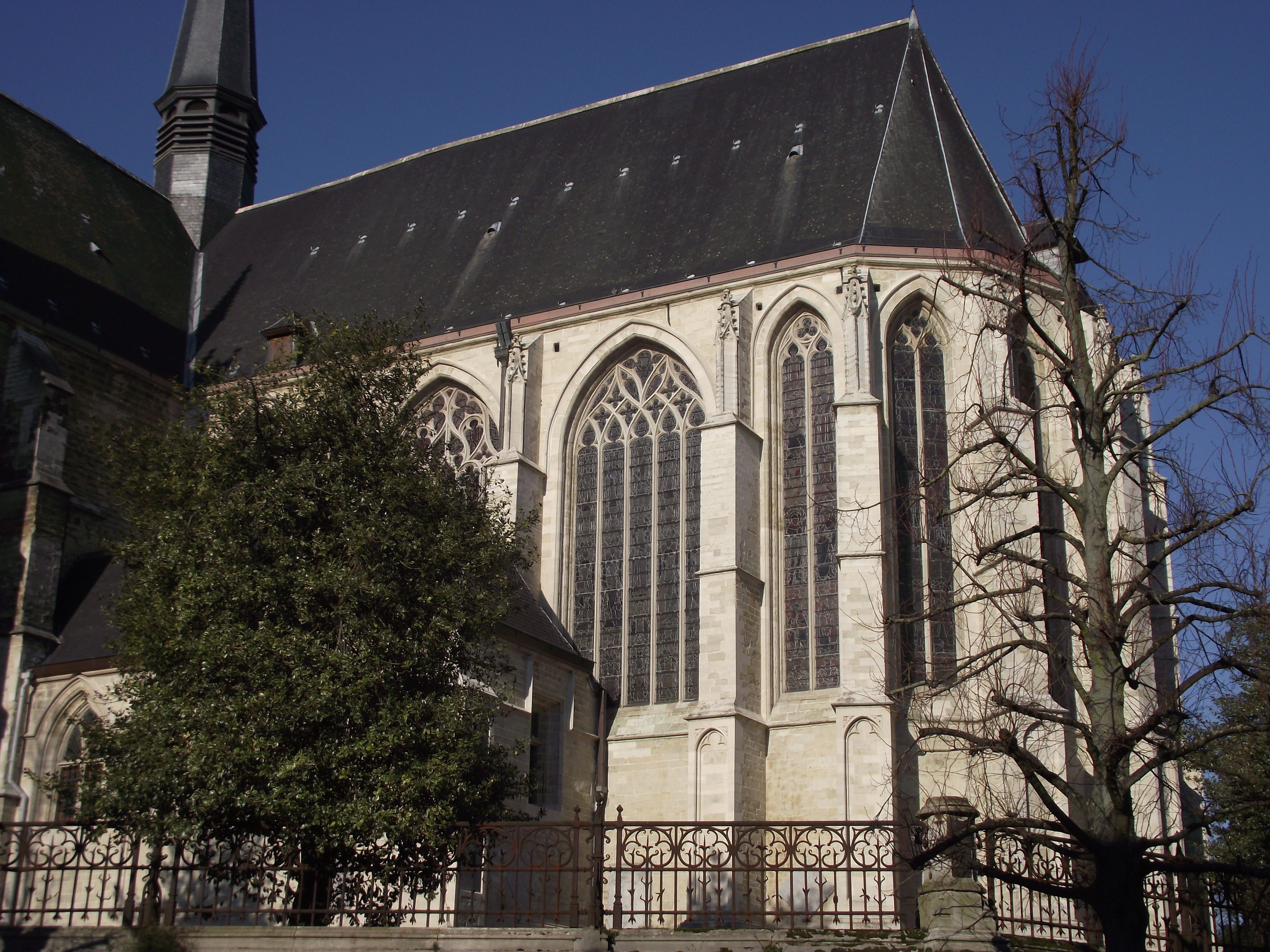 Anderlecht, Collegiata dei Santi Pietro e Guido, 1350-1527